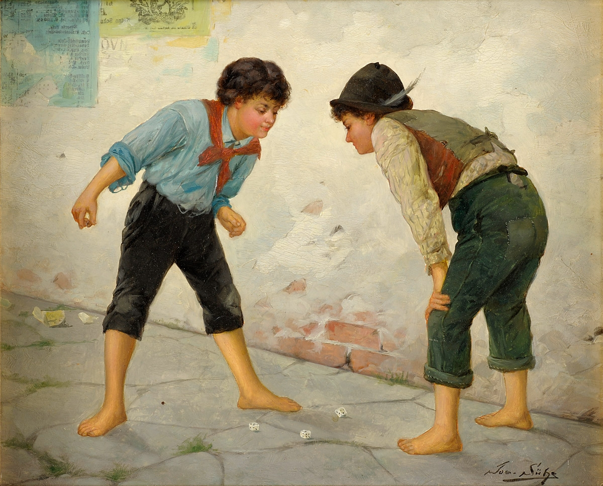 Jungen beim Würfelspiel. Öl auf Holz, 26 x 31,5 cm